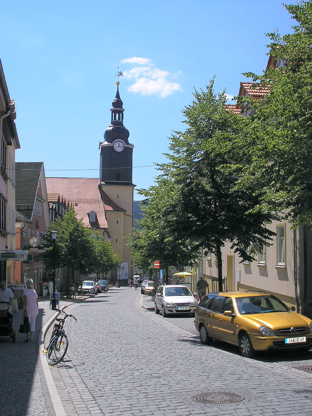 Bick durch die Marktstraße von Ilmenau (Thüringen).